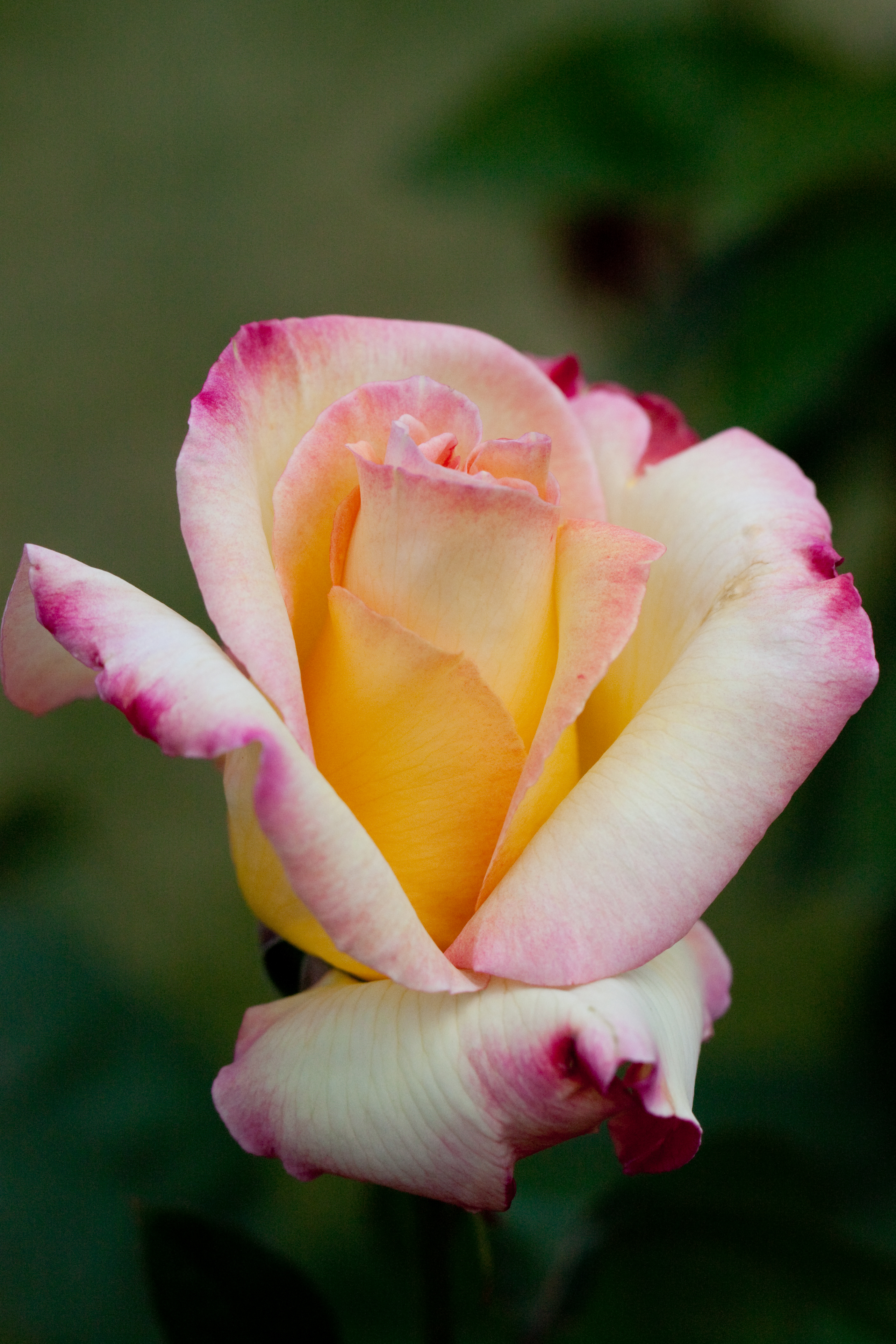 Garden Party. ガーデンパーティ。